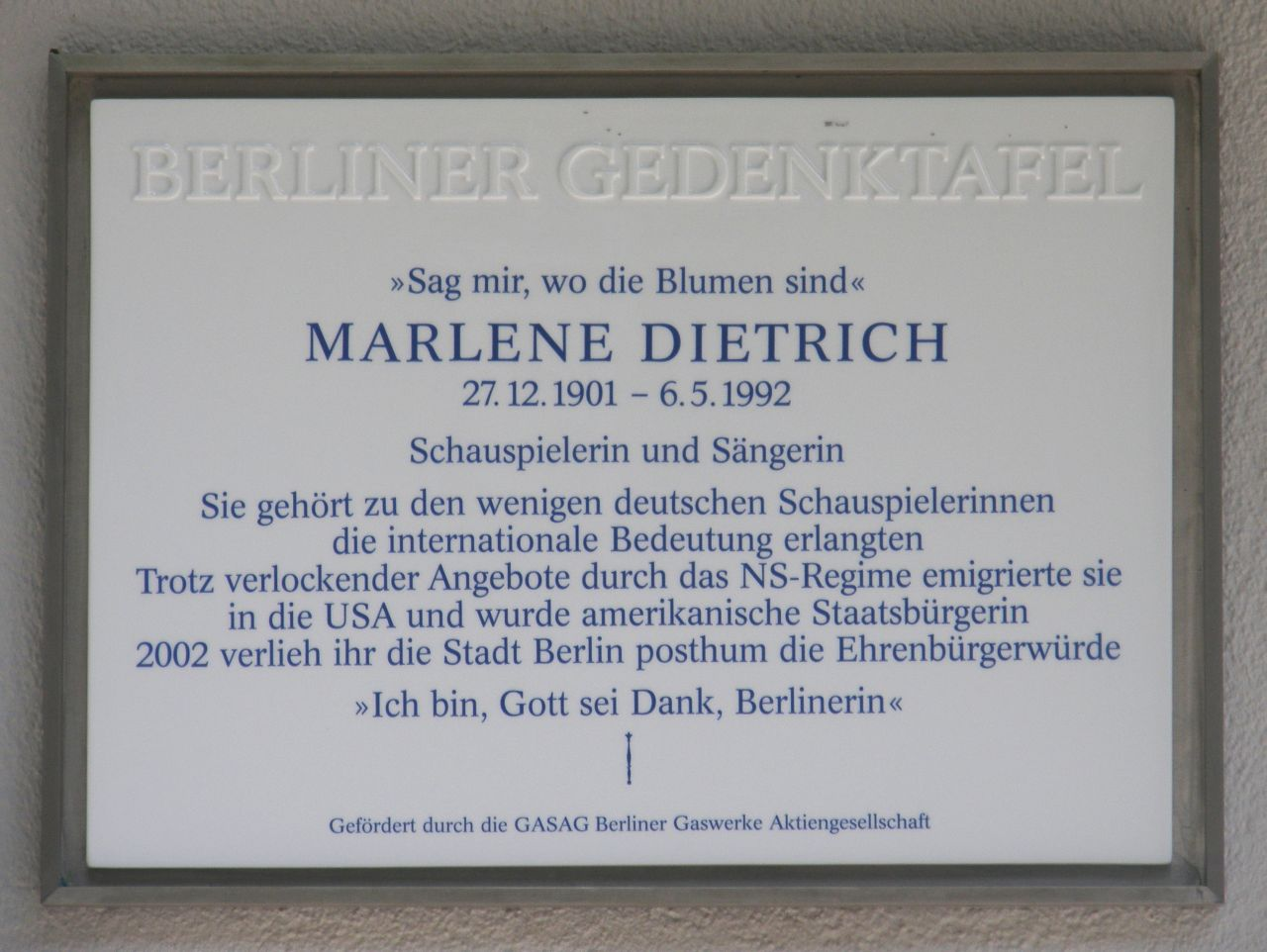 Berliner Gedenktafel für Marlene Dietrich, Leberstraße 65, Berlin-Schöneberg